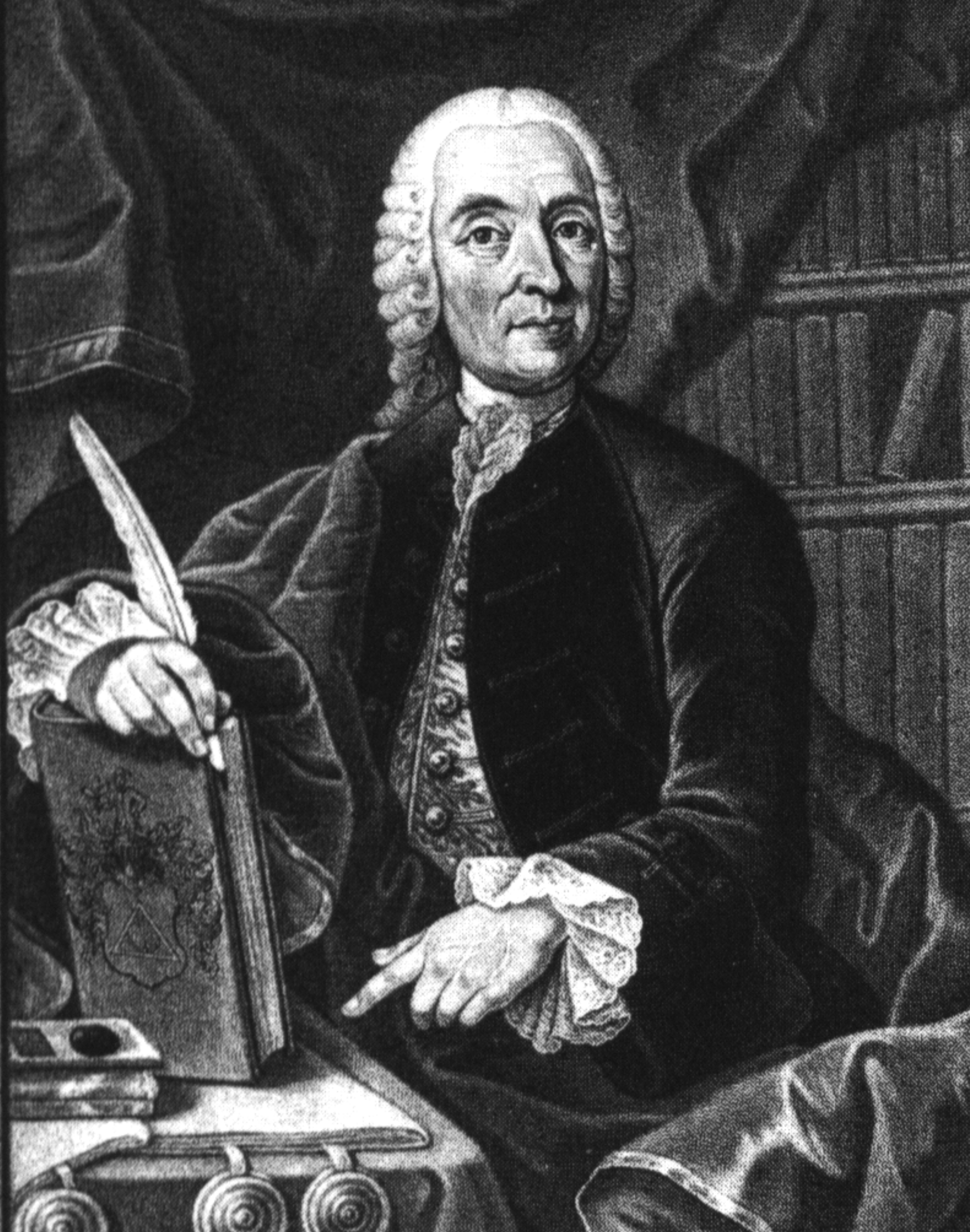 Christian Ernst Hanßelmann, German archivist and archaeologist